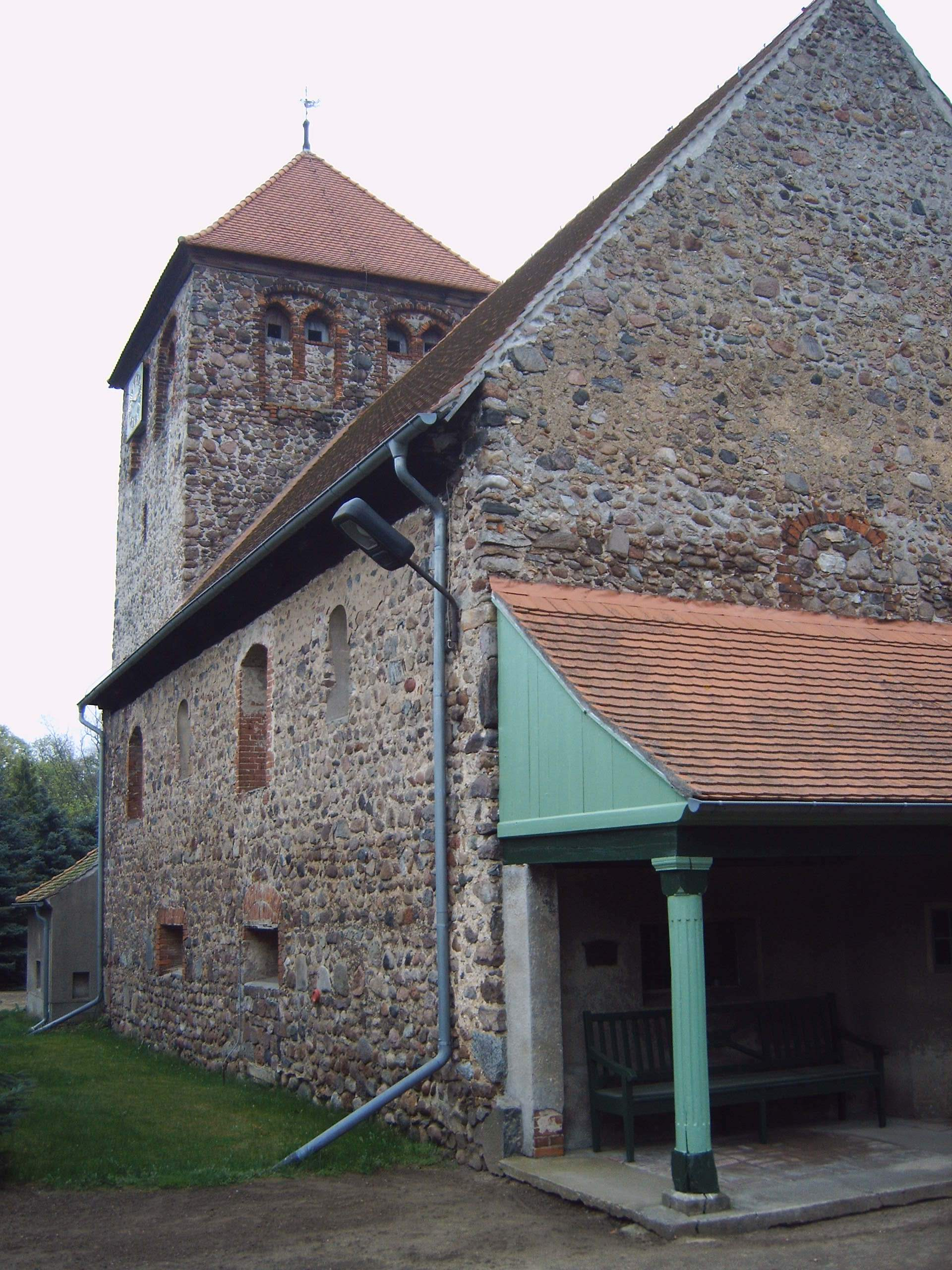 Dorfkirche Hohenseeden, Sachsen-Anhalt, Deutschland - Bild aufgenommen am 27.4.2006 durch Olaf Meister Bildqualität verbessert durch Picman